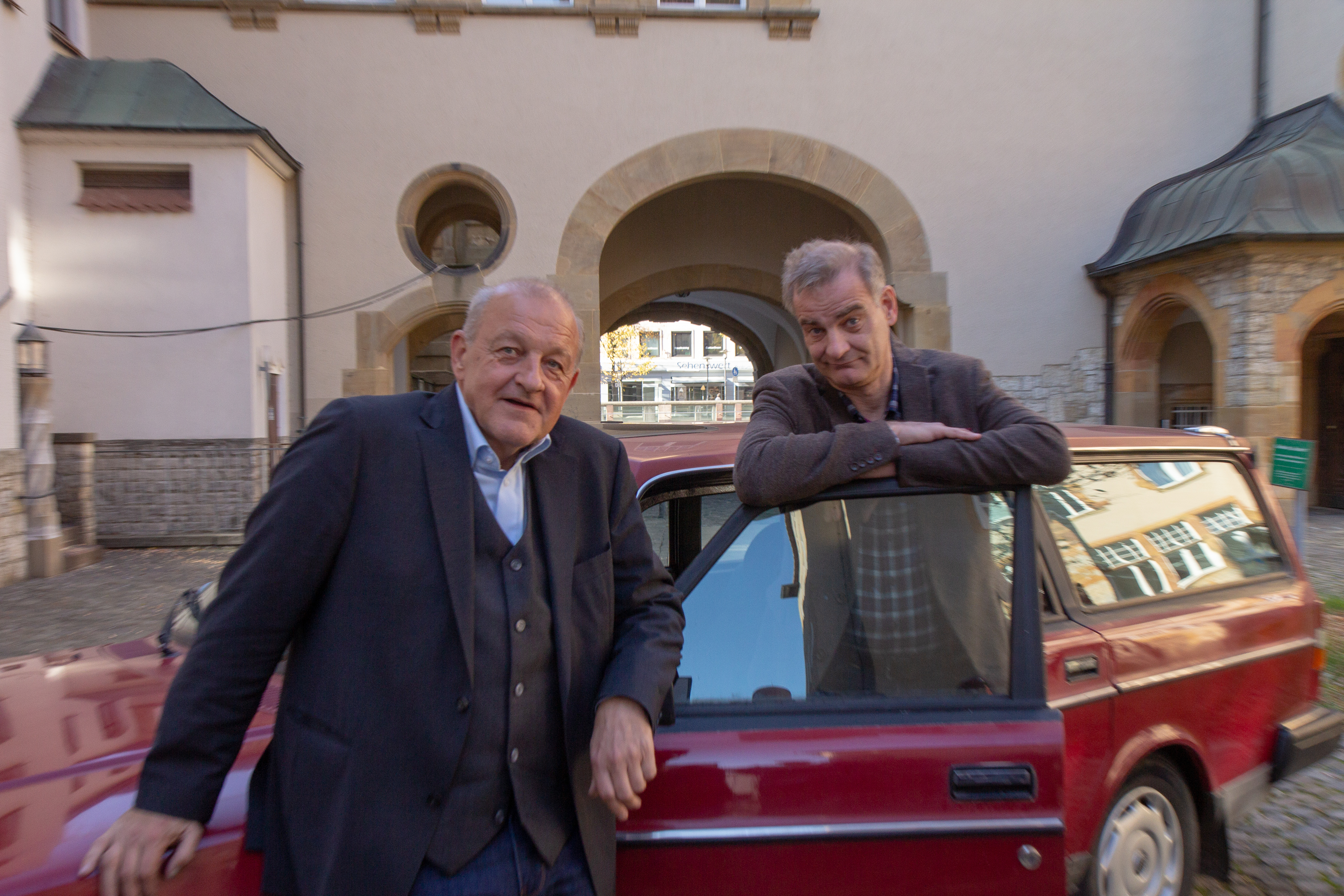 Pressetermin am Set "Wilsberg" am Alten Rathaus in Bielefeld am 15. Oktober 2018. Gruppe: Lansink_Schafmeister; beide am roten Volvo